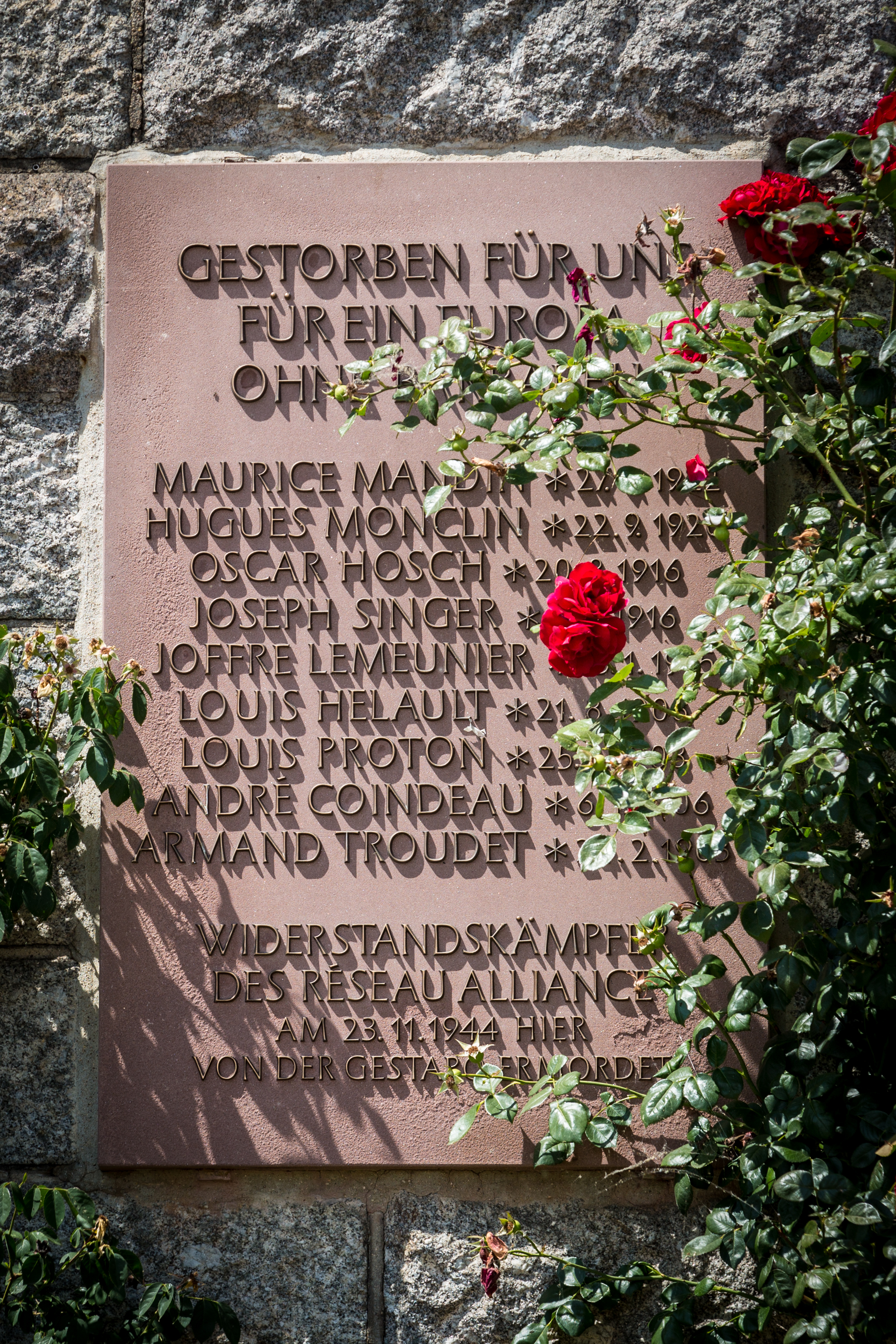 Gedenktafel an der Rheinbrücke in Kehl zur Erinnerung an neun Mitglieder des Réseau Alliance, die am 23. November 1944 an diesem Ort von der Gestapo ermordet und deren Leichen in den Rhein geworfen wurden.